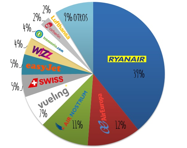 Distribución del porcentaje del Aeropuerto de Valencia (2013)